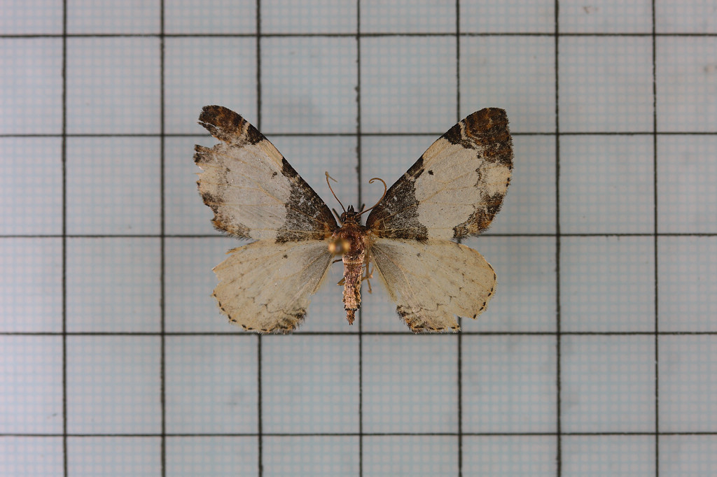 Protonebula altera (Bastelberger, 1911) 銀白紋波尺蛾 張保信 台灣蛾類圖說三:P.260